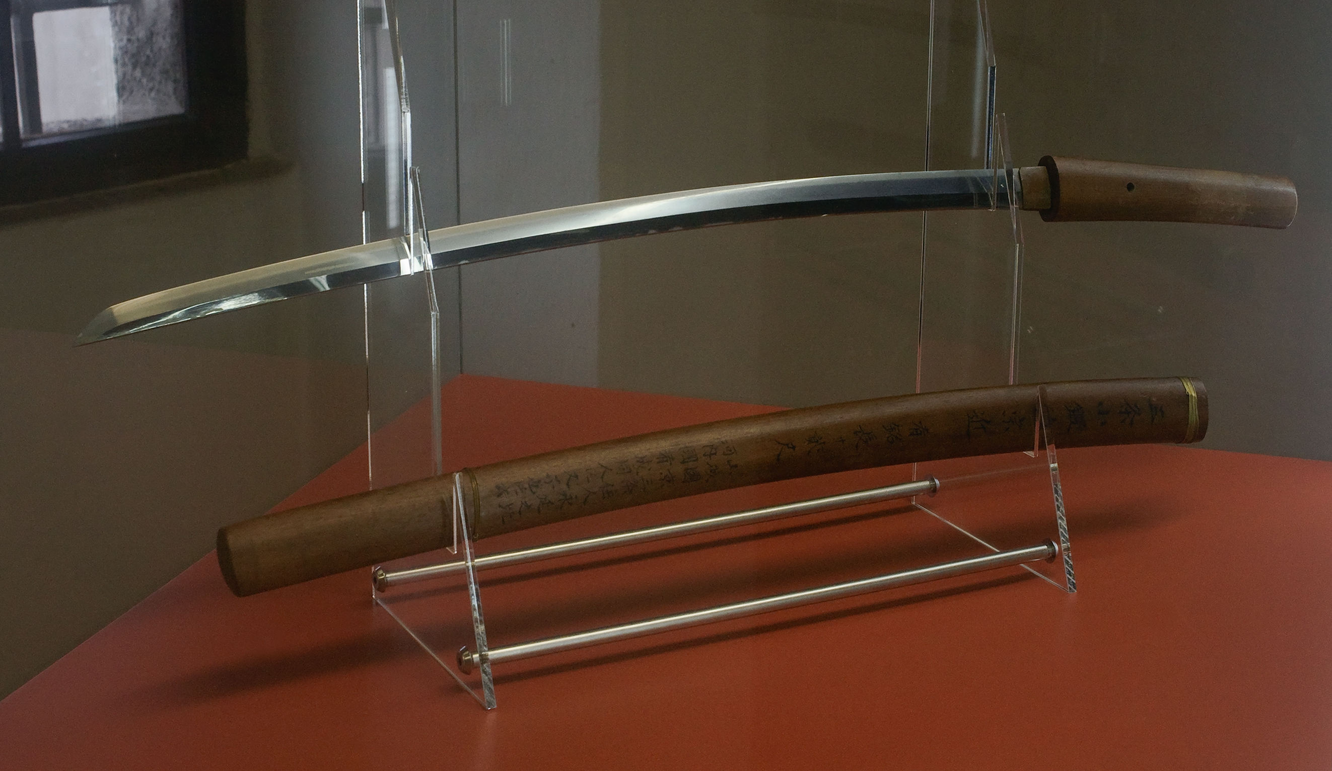 Munechika-Schwert (Munetschika) im Museum der Stadt Steyr (Sonderausstellung)